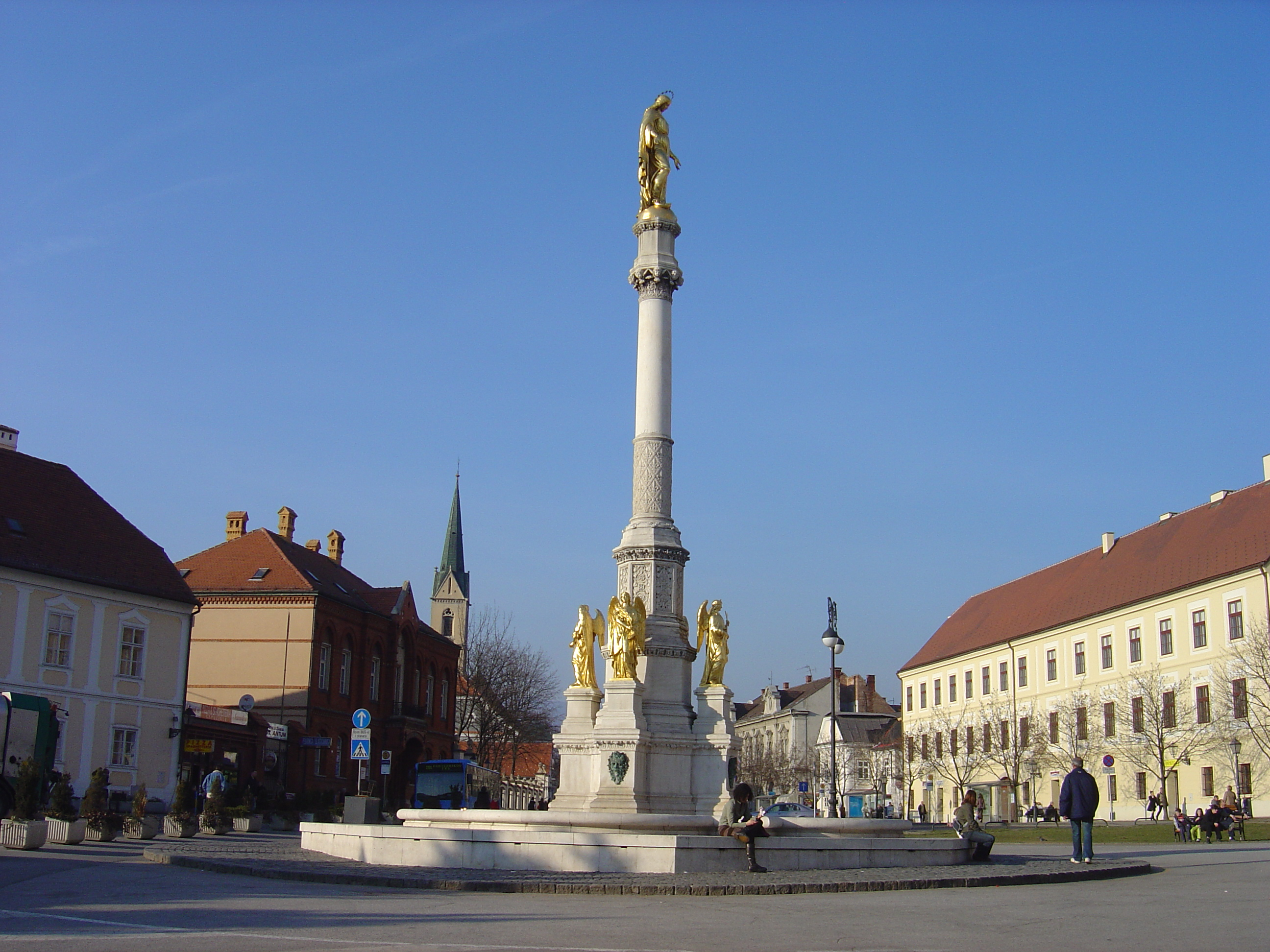 Zagreb, Croatia